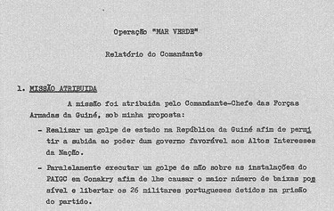 Az Operacio Mar Verde (magyarul: Zöld Tenger hadművelet) támadásról szóló jelentés. Szerzője a támadás portugál parancsnoka, Alpoim Calvão. Fordítás: "Zöld Tenger" hadművelet Jelentés a parancsnokságnak A hadművelet céljai A Guineai Fegyveres Erők Főparancsnoka, javaslatomra, a következő célokat jelölte ki: államcsíny végrehajtása a Guineai Köztársaságban, azzal a céllal, hogy az állam legfelsőbb érdekeit támogató kormányzat kerüljön hatalomra egyidejűleg csapást mérjen a PAIGC Conakry-ban található létesítményeire, hogy a lehető legnagyobb veszteséget okozza nekik és kiszabadítsa az általuk fogva tartott 26 portugál hadifoglyot."